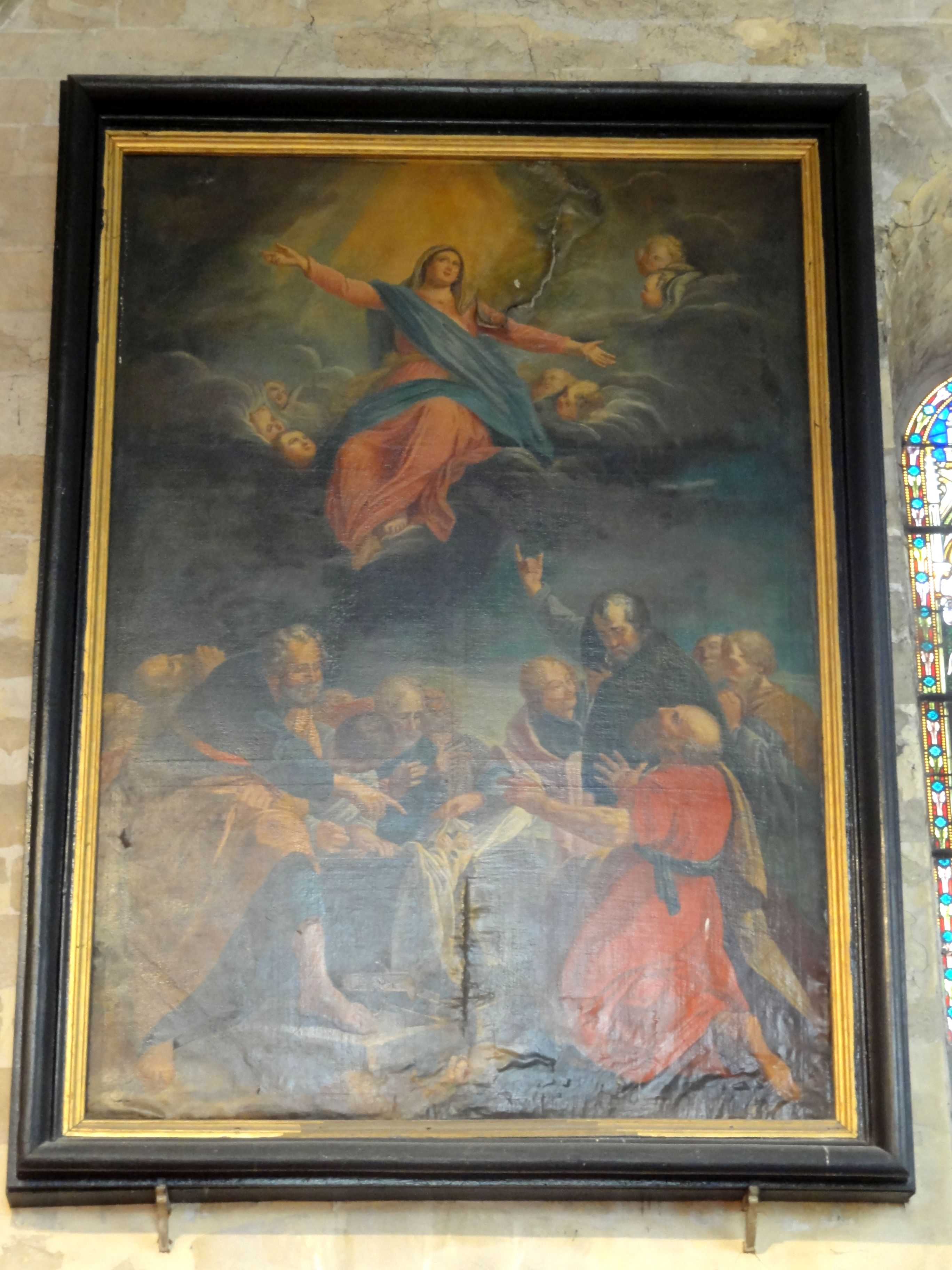 Tableau représentant l'Assomption de Marie, œuvre de 1772 attribuée à Louis Bar(r)ere, et considérée comme copie interprétée d'une autre œuvre peinte par Laurent de la Hyre en 1635 et aujourd'hui au musée du Louvre.